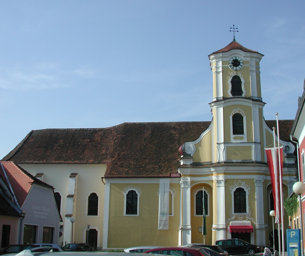 Fürstenfelder Erimiten AugustinerKirche